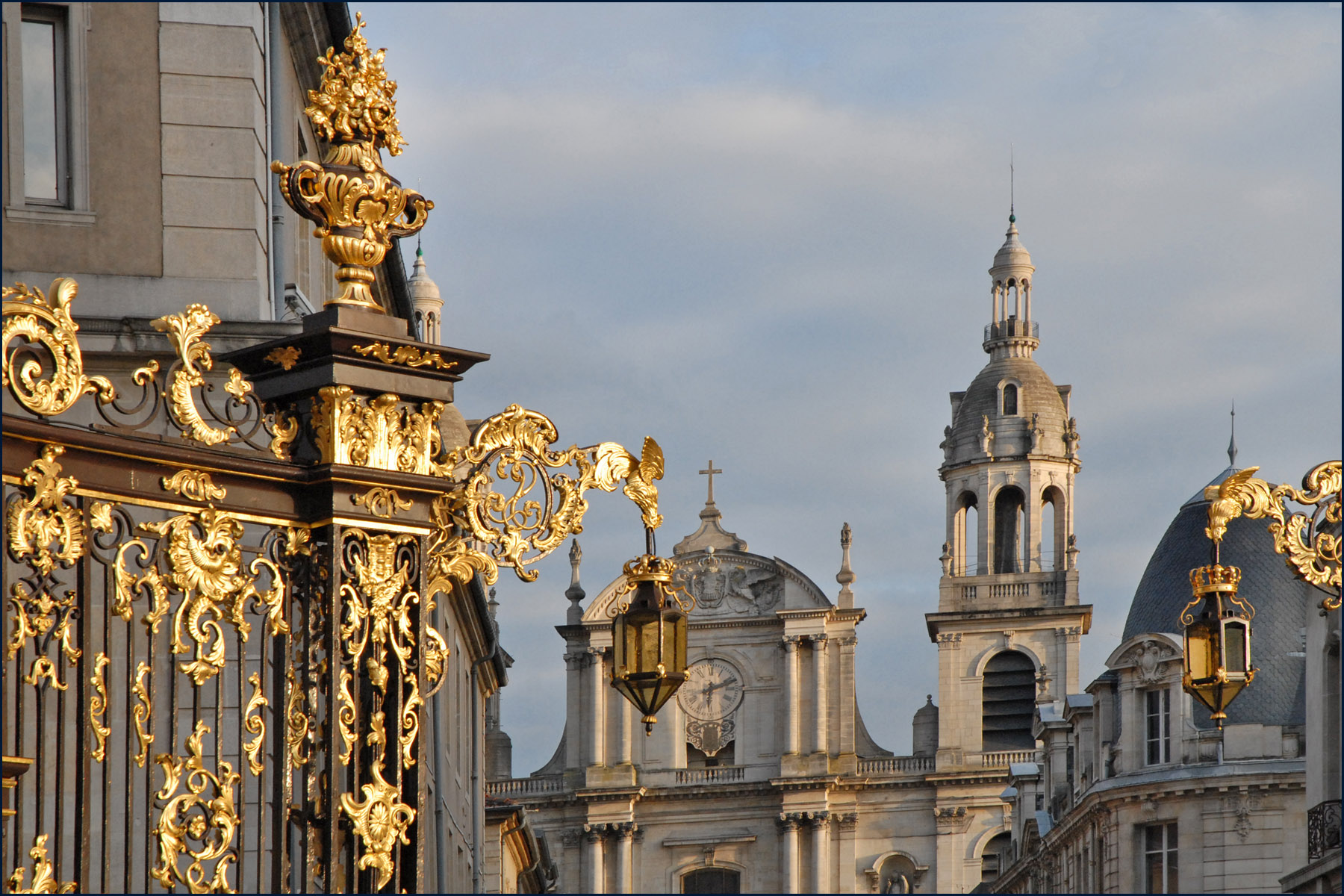 Ferronneries de Jean-Baptiste Lamour (1698- 1771) de la place Stanislas. Réalisées entre 1751 et 1755 dans le style Louis XV avec pour décors des feuilles d'acanthe, coquilles, vases de fleur, animaux recouverts de dorure. Au fond, la cathédrale Notre-Dame-de-l'Annonciation de Nancy.